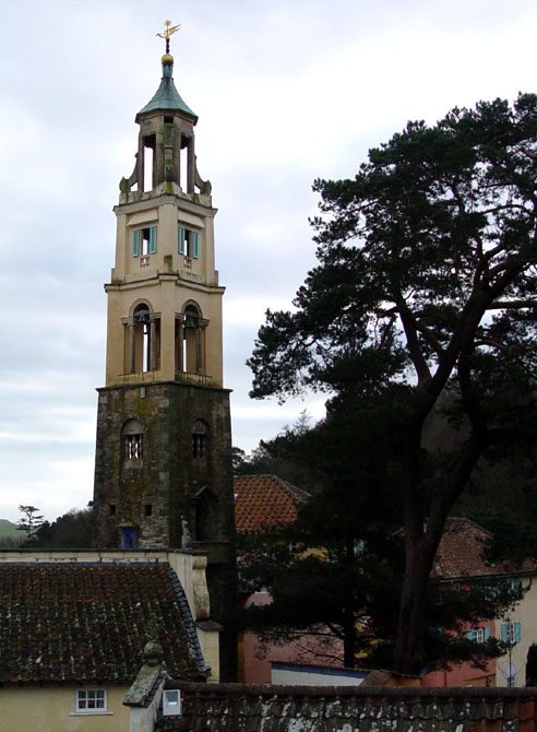 portmeirion